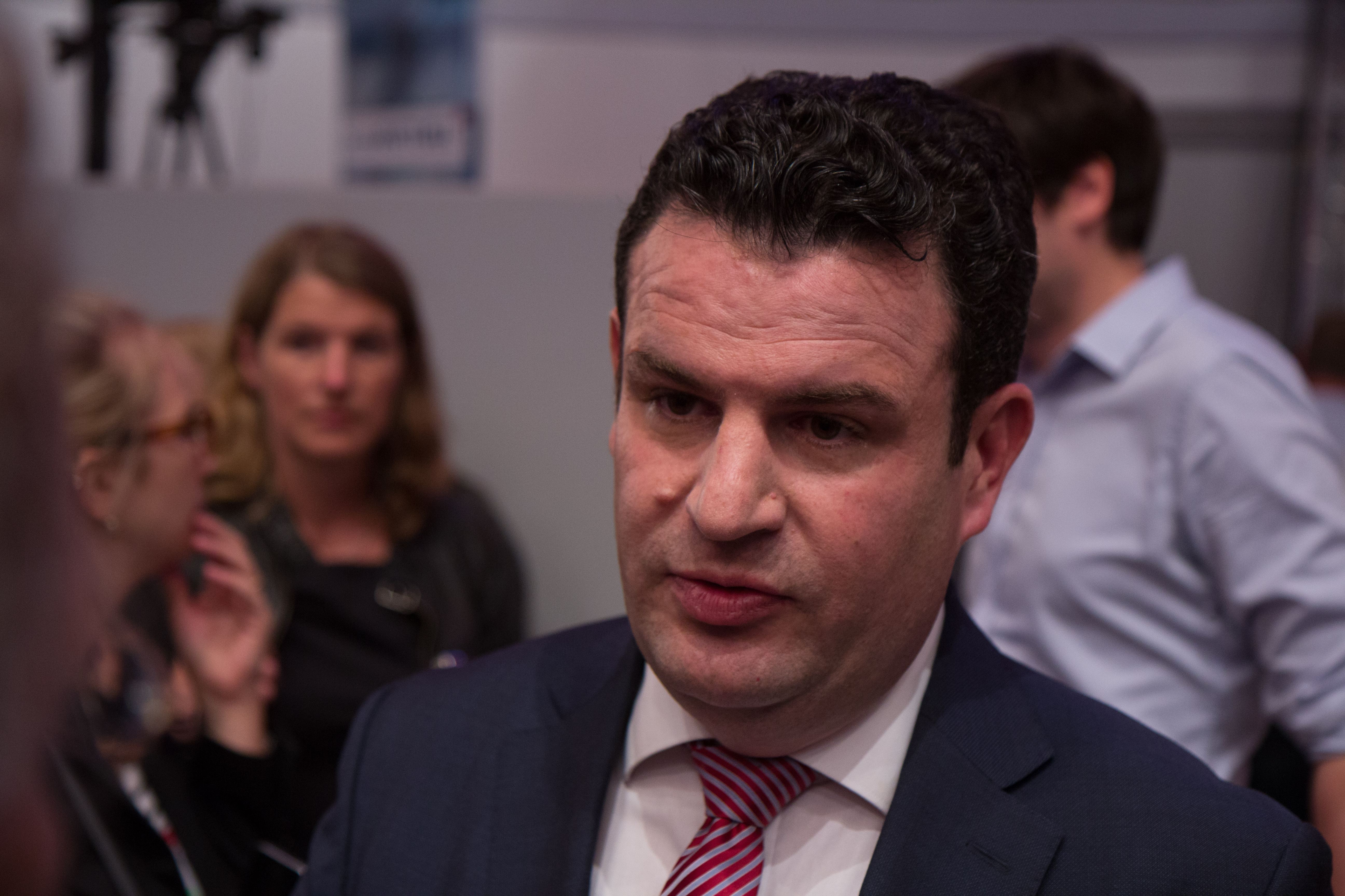 Hubertus Heil auf dem SPD Bundesparteitag am 25. Juni 2017 in Dortmund